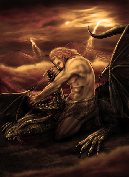 Ваагн, армянский бог